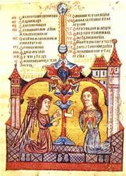 Hvalov zbornik, illustrated slavic manuscript from medieval Bosnia.